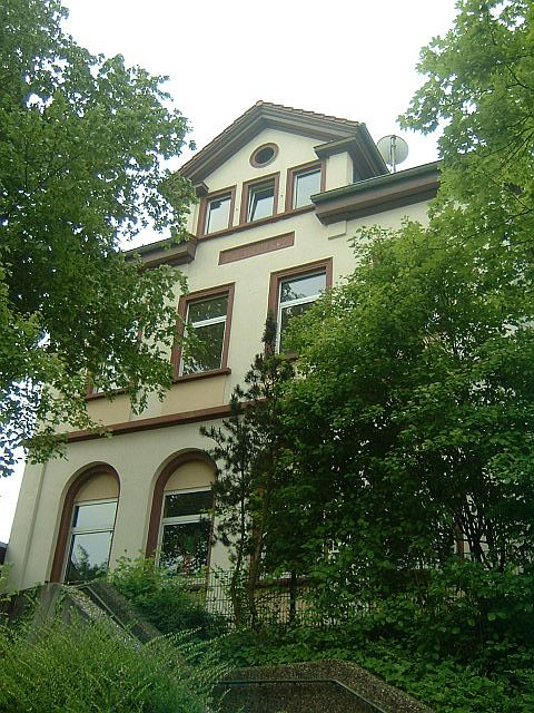 Die alte Schule in Liederbach am Taunus. Heute befindet sich Ateliers, Gemeinschaftsräume, kleines Heimatmuseum und eine Kindertagesstätte darin. Selbst erstellt am 15.6. 2006 --Peng 10:35, 15 June 2006 (UTC)